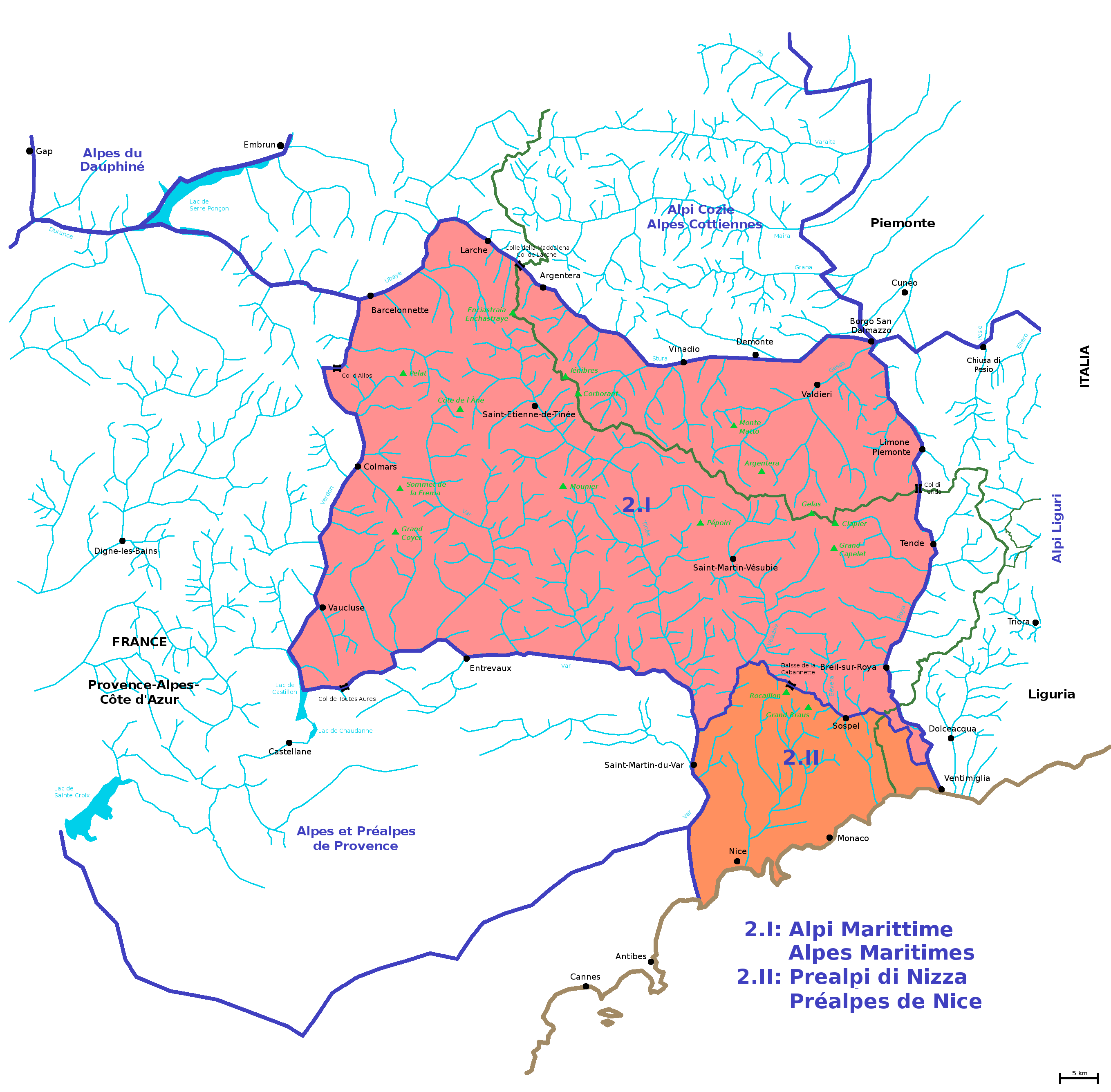 Carta schematica della sezione numero 2 delle Alpi secondo la SOIUSA (Alpi Marittime e Prealpi di Nizza) con evidenziati: le sottosezioni, l'idrografia, i centri abitati principali, le vette principali.